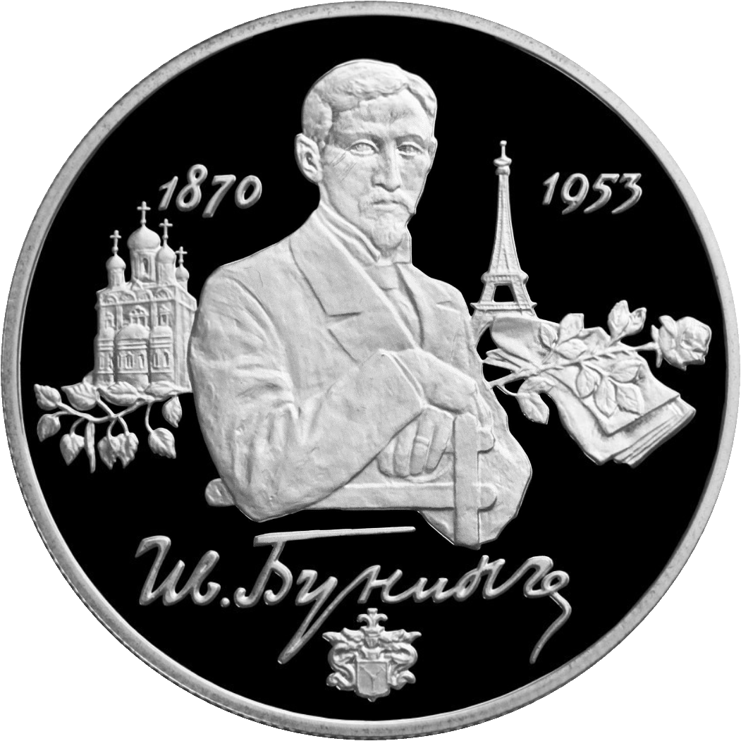 Монета Банка России — Серия: «Выдающиеся личности России», 125-летие со дня рождения И.А. Бунина, 2 рубля, реверс.